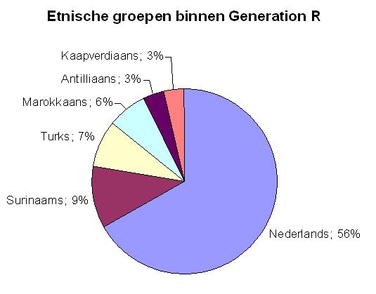 Figuur met de verdeling van de verschillende etnische groepen die meedoen aan Generation R.